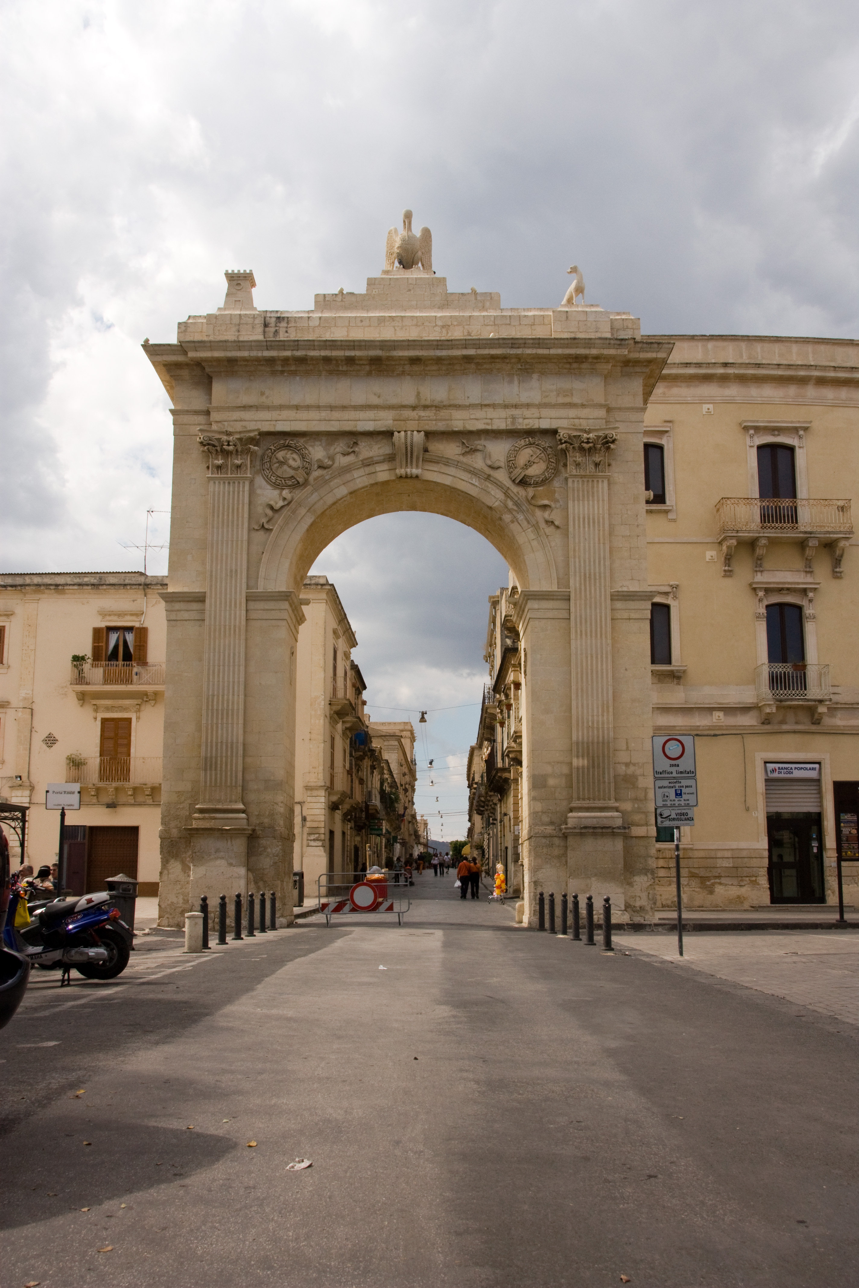 Porta Reale, Noto, Sicile, Italie.